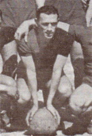 José Cantelli